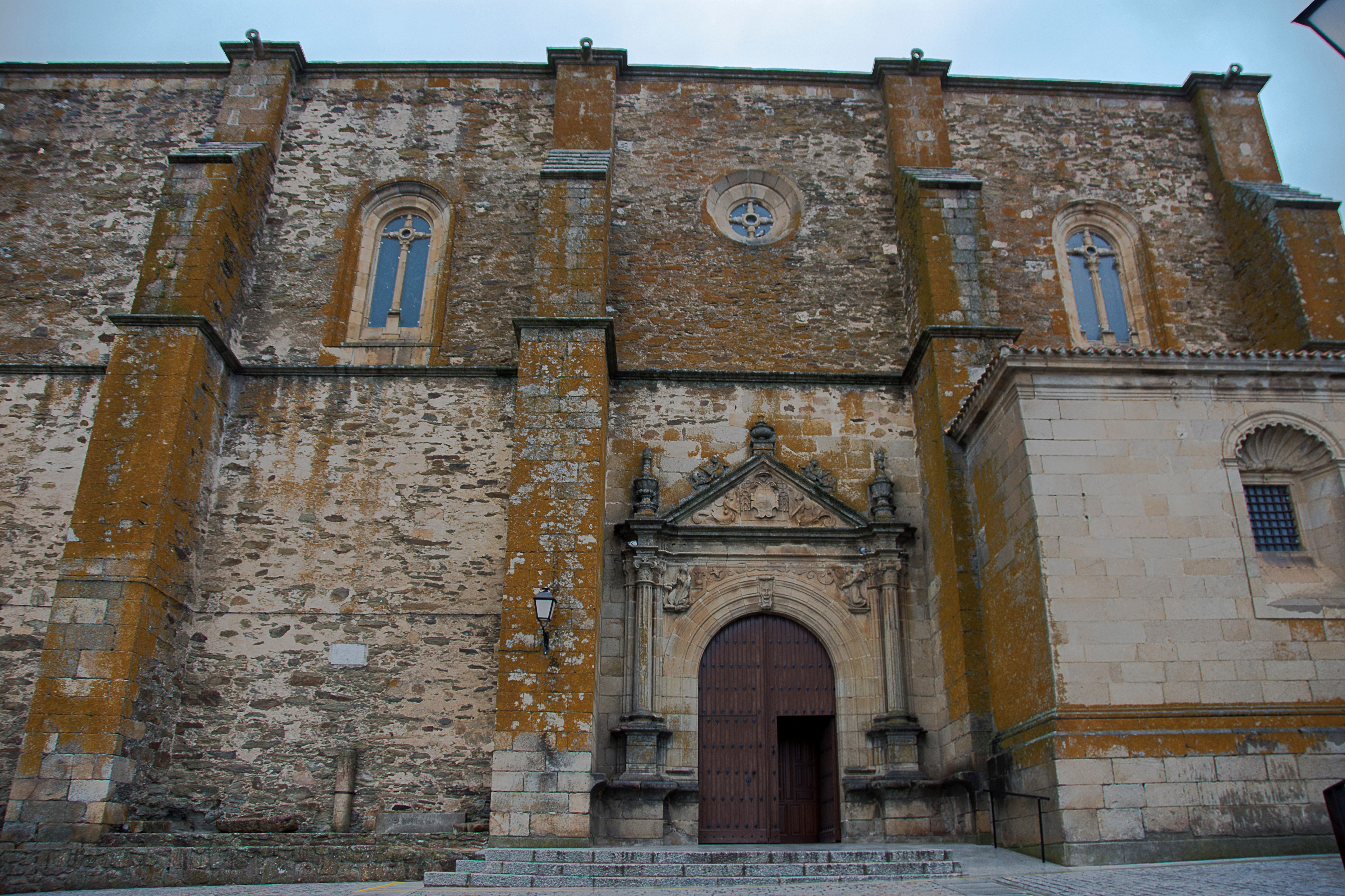 Fachada de la iglesia de San Juan Bautista de Malpartida de Plasencia (Provincia de Cáceres, España)